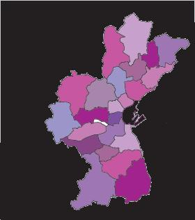 Århus bydele